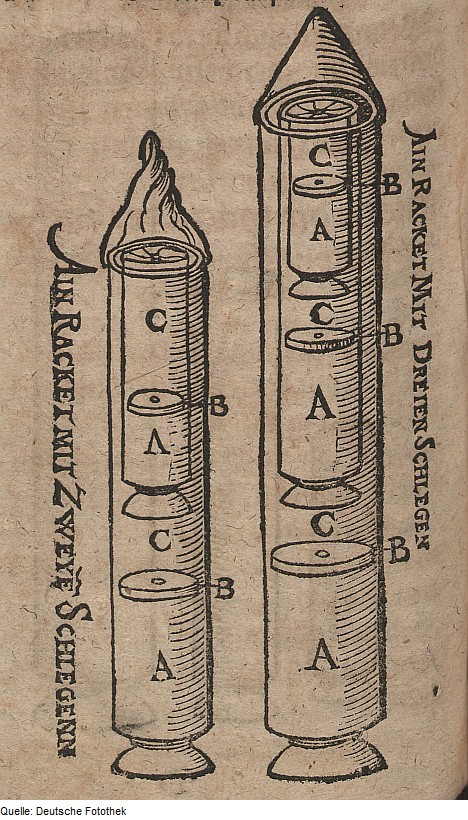 Original image description from the Deutsche Fotothek Pyrotechnik & Feuerwerk & Rakete